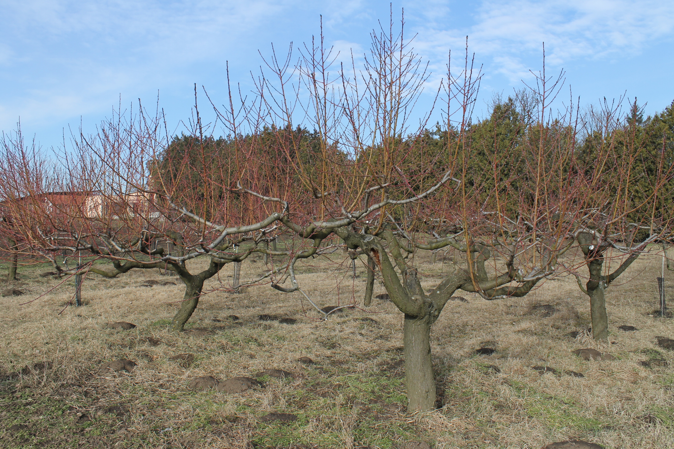 broskvový sad před řezem, únor, jih Moravy